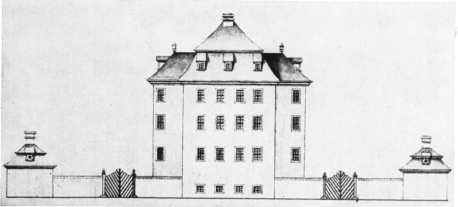 Schloss Marientraut, Aufriss aus der Erbauungszeit